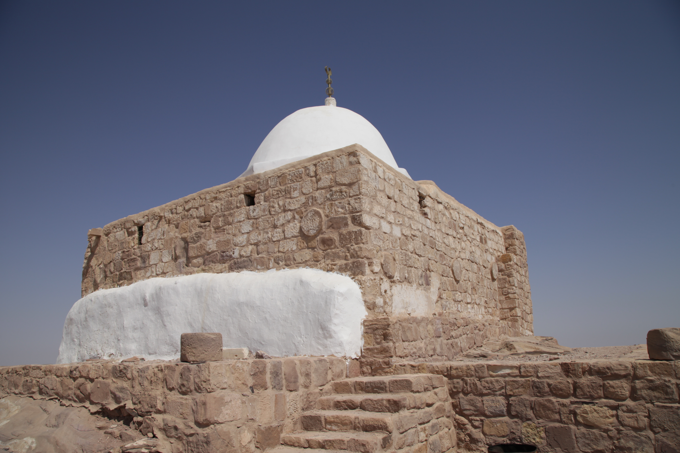 Pétra - Jordanie 07/2012